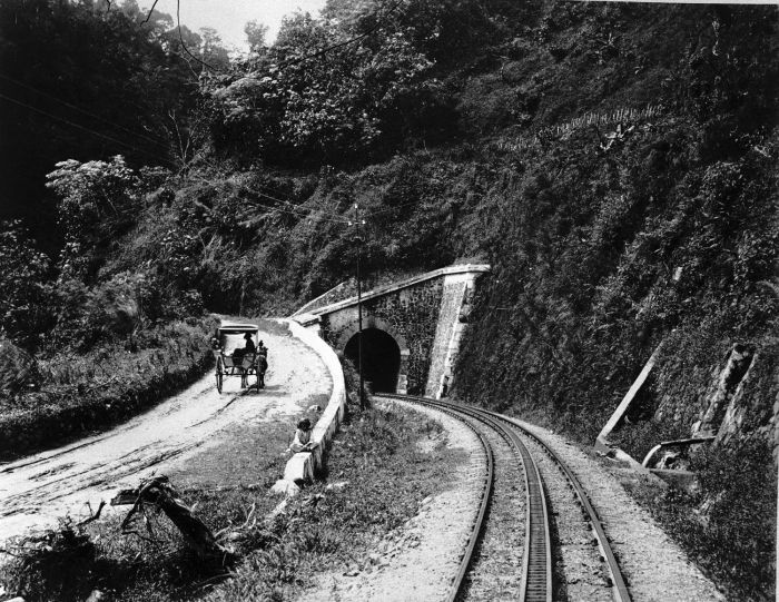 Foto. Weg en tandradspoor door de kloof van Anei, Sumatra`s Westkust